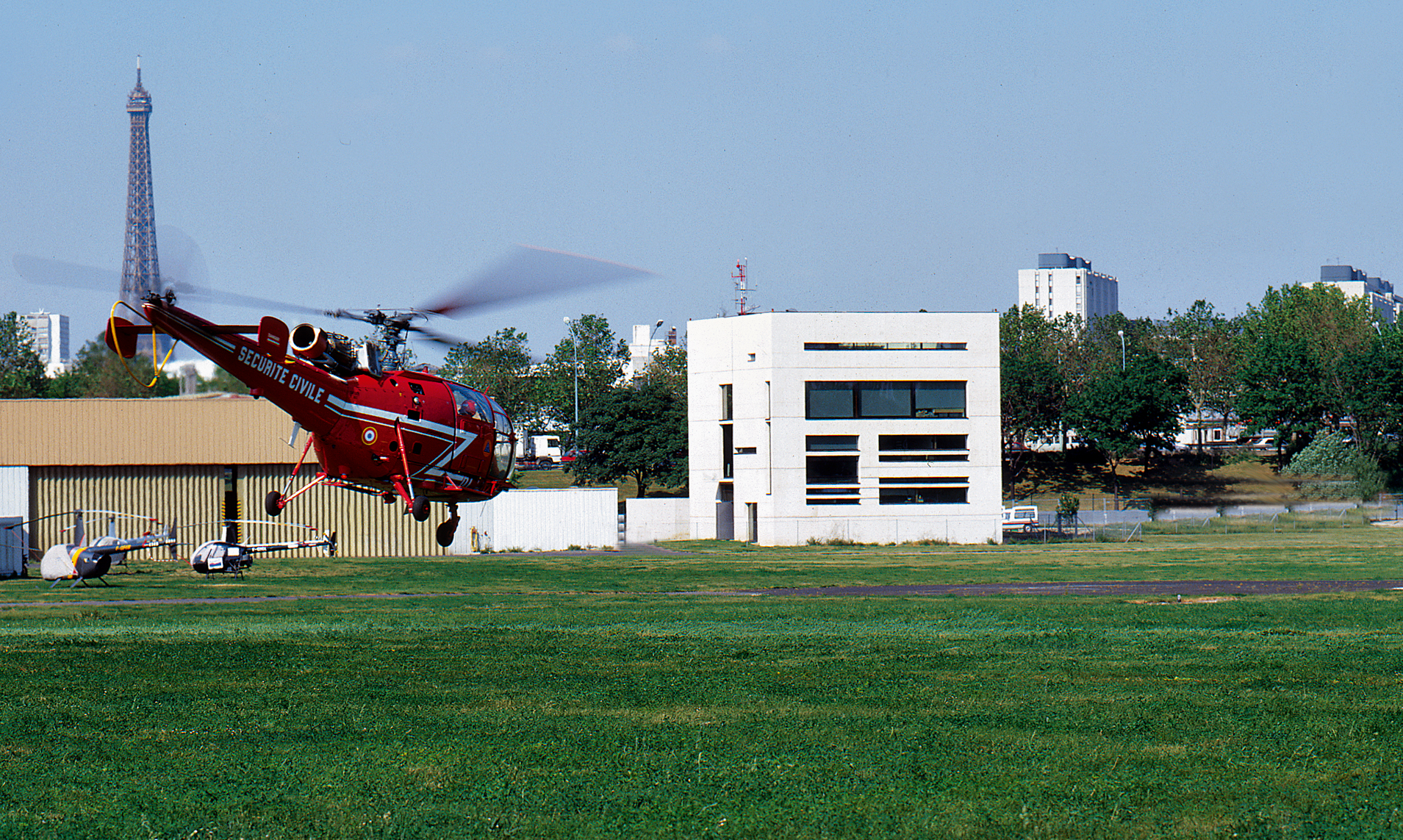 Héliport de Paris : bâtiment technique (architectes : RIchard et Schoeller).